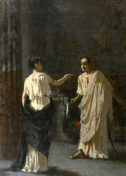 Francesco Filippini. Fulvia che svela a Cicerone la congiura di Catilina (1879)